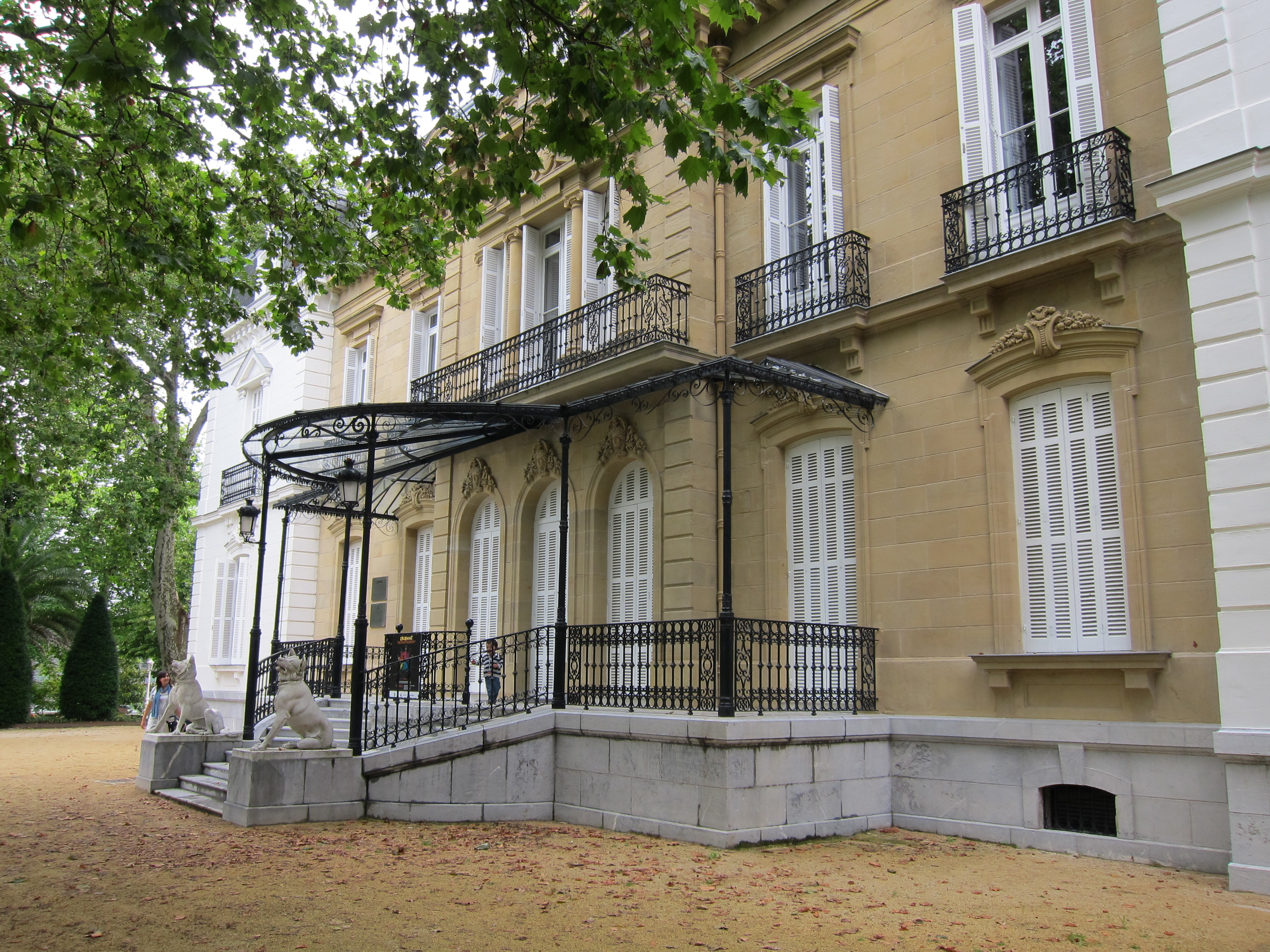 Casa de la Paz y los Derechos Humanos, San Sebastian